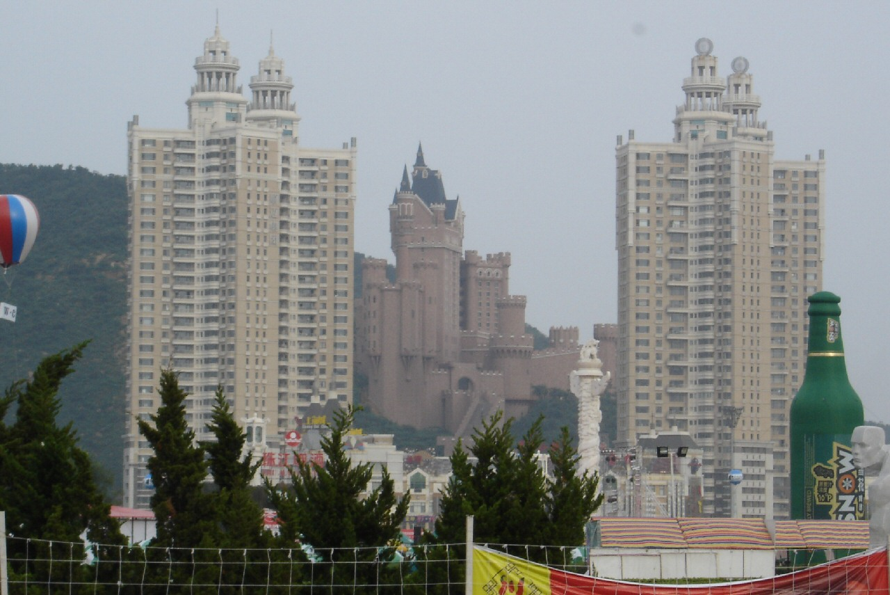 El Shengya Ocean World de Dalian con forma de castillo medieval. The Dalian Aquarium resembling a romantic castle. Picture taken Aug 7, 2005 by submitter.